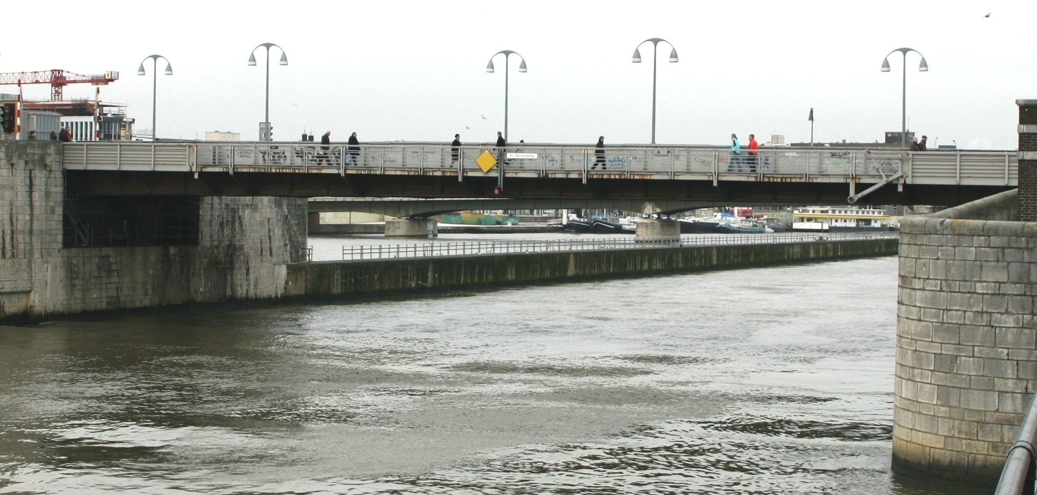 Sint Servaashiefbréck erofgelooss.